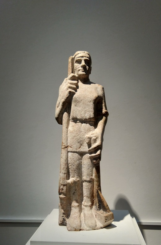 Работа скульптора Дмитрия Цаплина - "Оборона и труд". Государственная Третьяковская галерея, 1933-1934 гг.